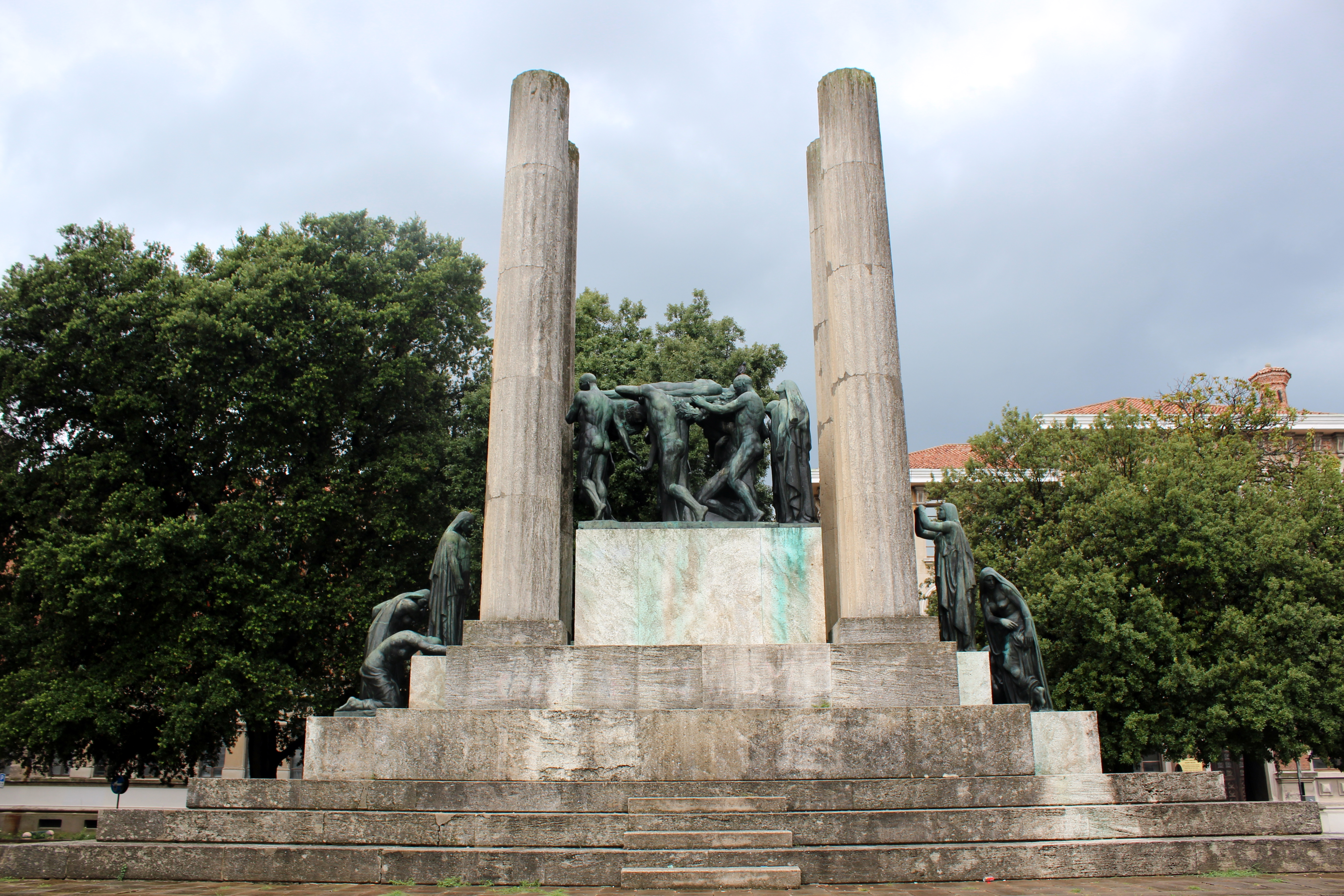 Monumento ai caduti del prima guerra mondiale collocato in Piazza della Vittoria a Treviso. Inaugurato nel 1932 è opera di Arturo Stagliano.